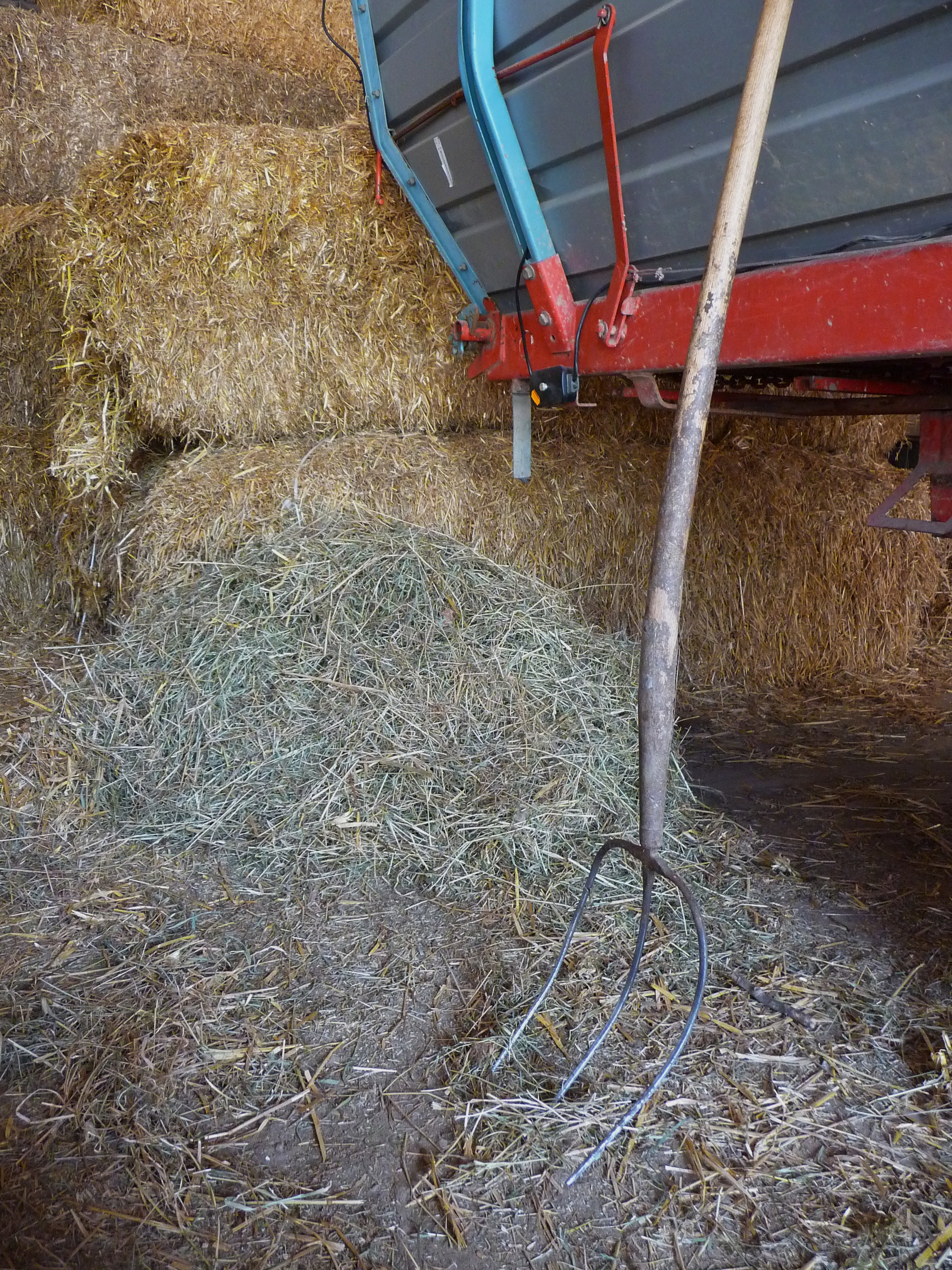 Heugabel, fotografiert in Baden-Württemberg (Deutschland)